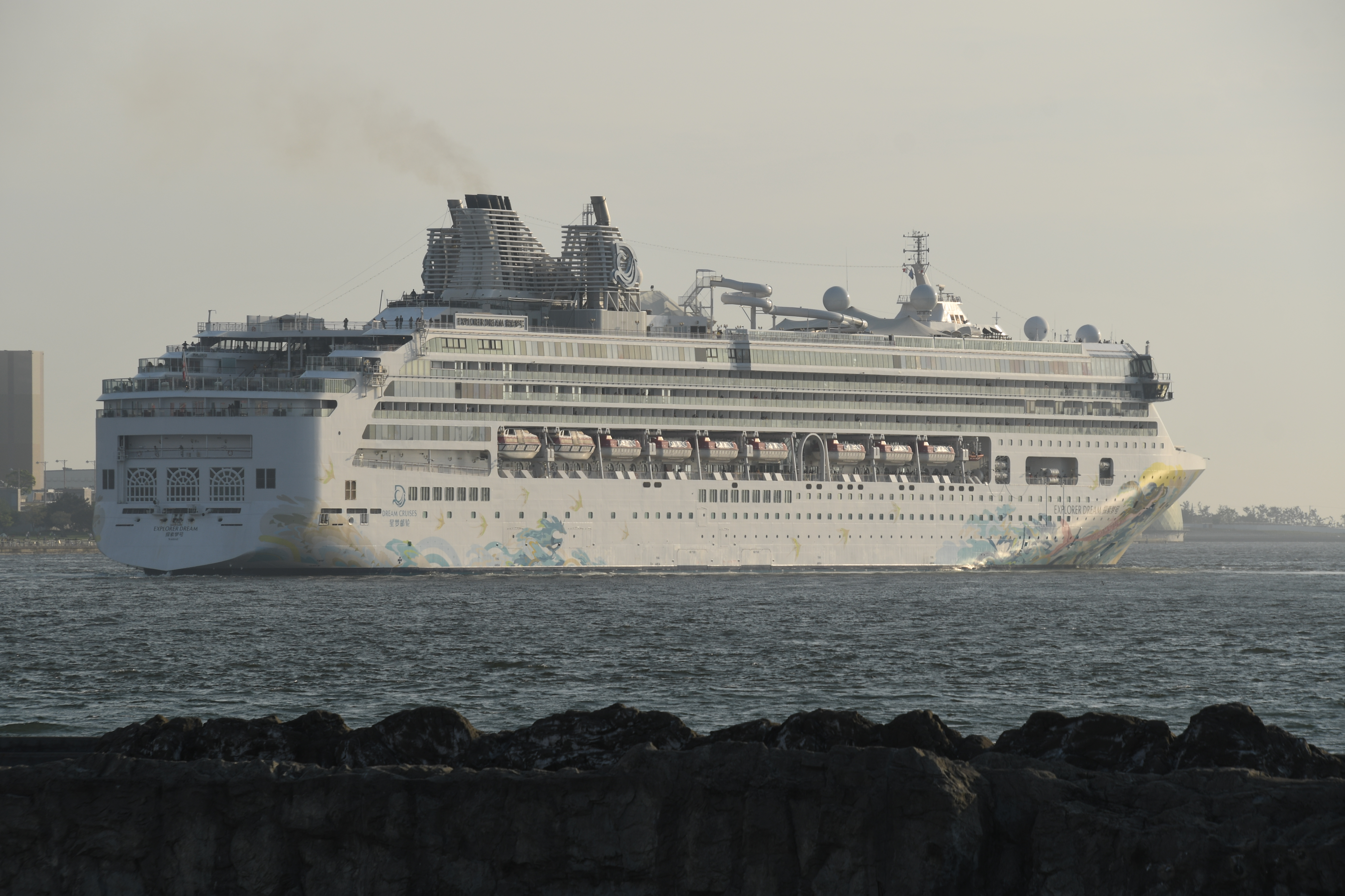 大阪天保山から出港するエクスプローラー・ドリーム